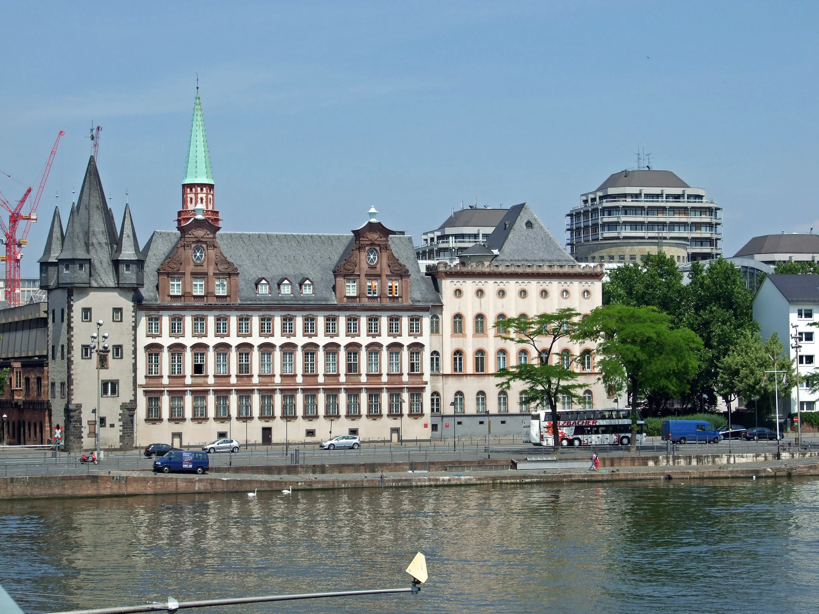 "Saalhof" in Ffm